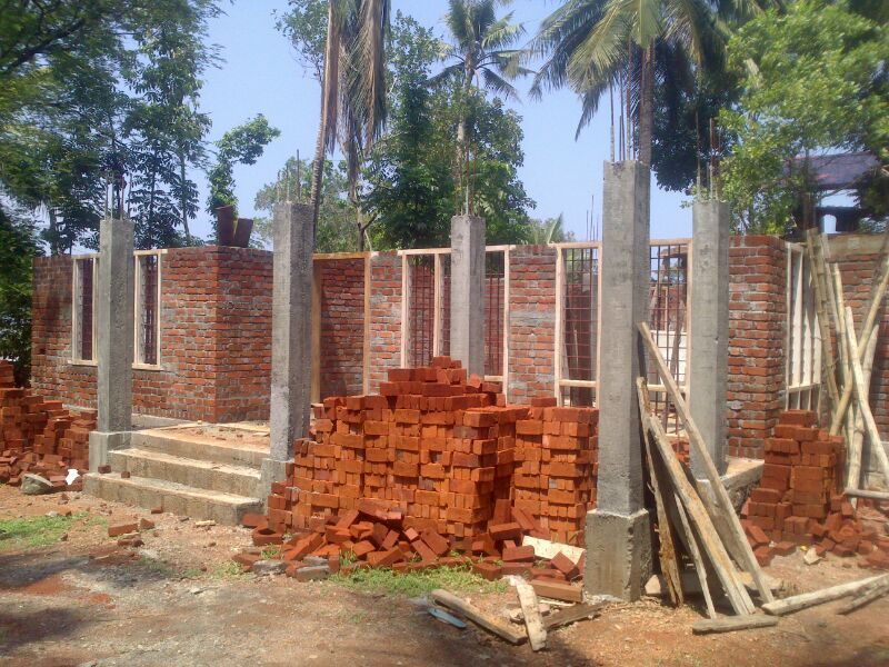 Brick (ഇഷ്ടിക)